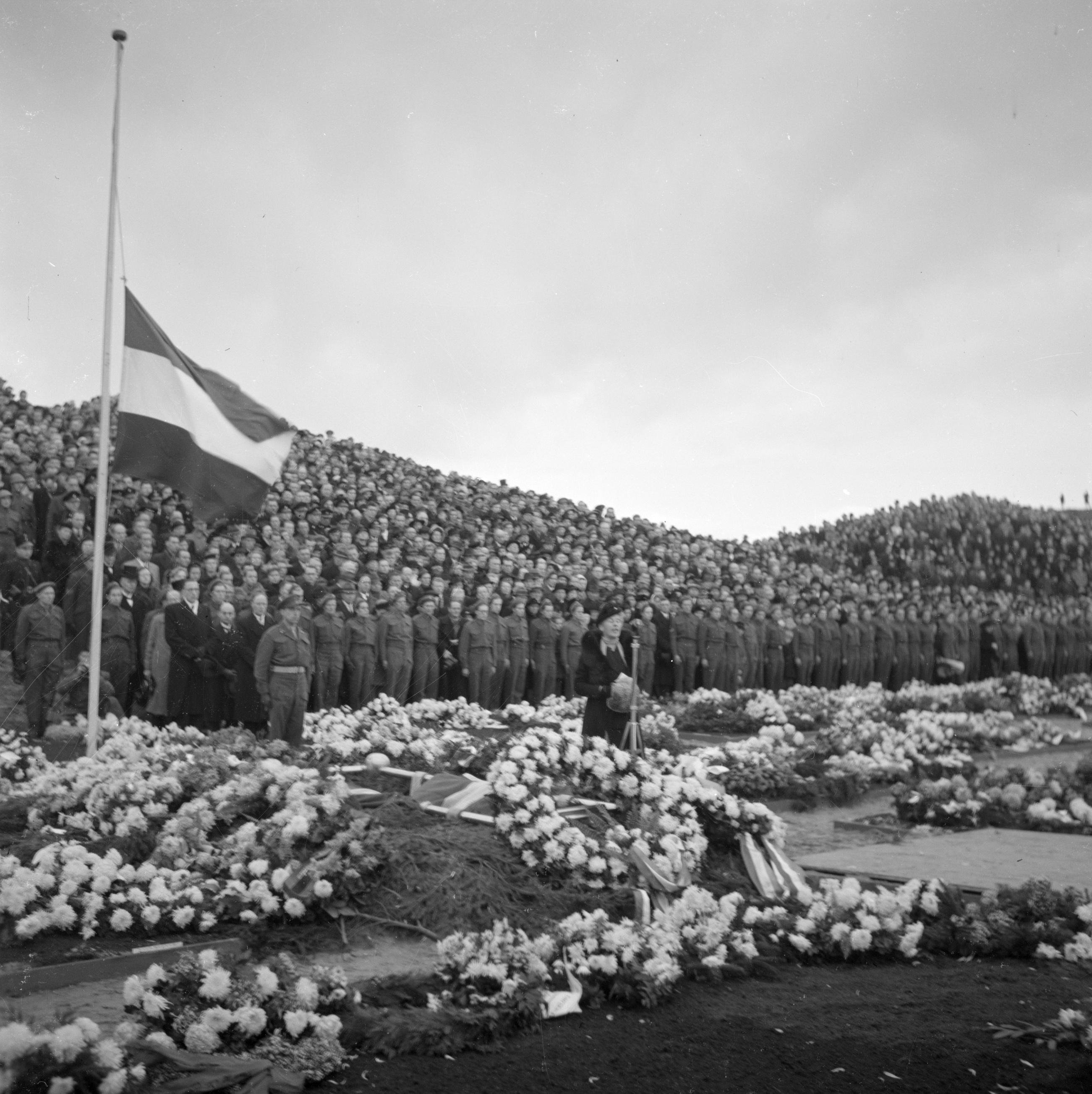 Collectie / Archief : Fotocollectie Van de Poll Reportage / Serie : Begrafenis verzetsstrijders Beschrijving : De erebegraafplaats Bloemendaal in Overveen Annotatie : Op de erebegraafplaats liggen 347 verzetsstrijders begraven. Op 27 november 1945 vond de inwijdingsbijeenkomst plaats in aanwezigheid van koningin Wilhelmina en prins Bernhard Datum : 27 november 1945 Locatie : Noord-Holland, Overveen Trefwoorden : begraafplaatsen Fotograaf : Poll, Willem van de Auteursrechthebbende : Nationaal Archief Materiaalsoort : Negatief (zwart/wit) Nummer archiefinventaris : bekijk toegang 2.24.14.02 Bestanddeelnummer : 255-9122